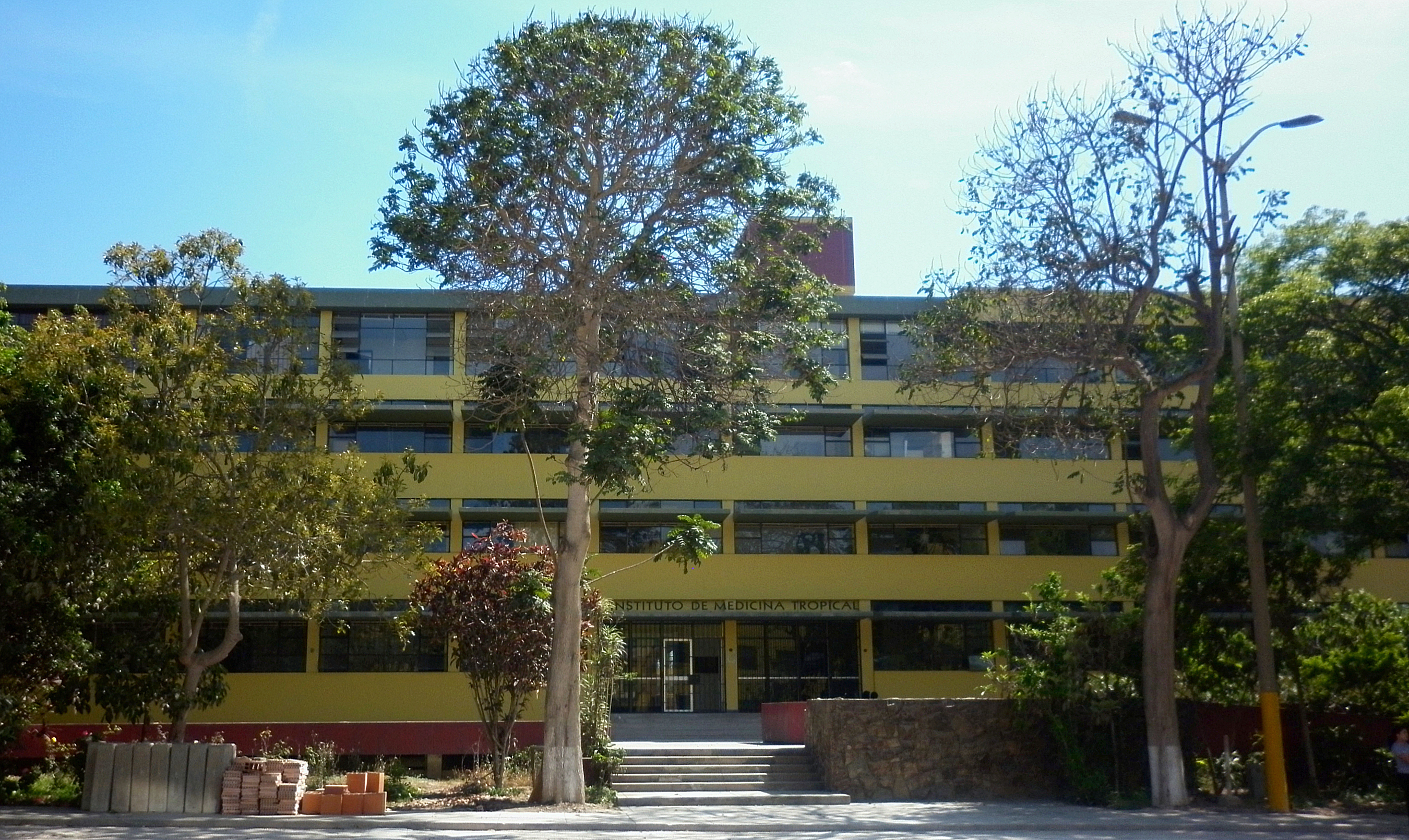 Instituto de Medicina Tropical "Daniel A. Carrión" de la Universidad Nacional Mayor de San Marcos